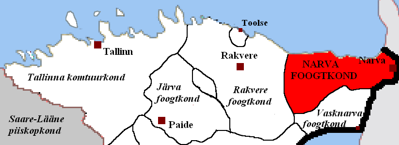 Narva foogtkonna kaart